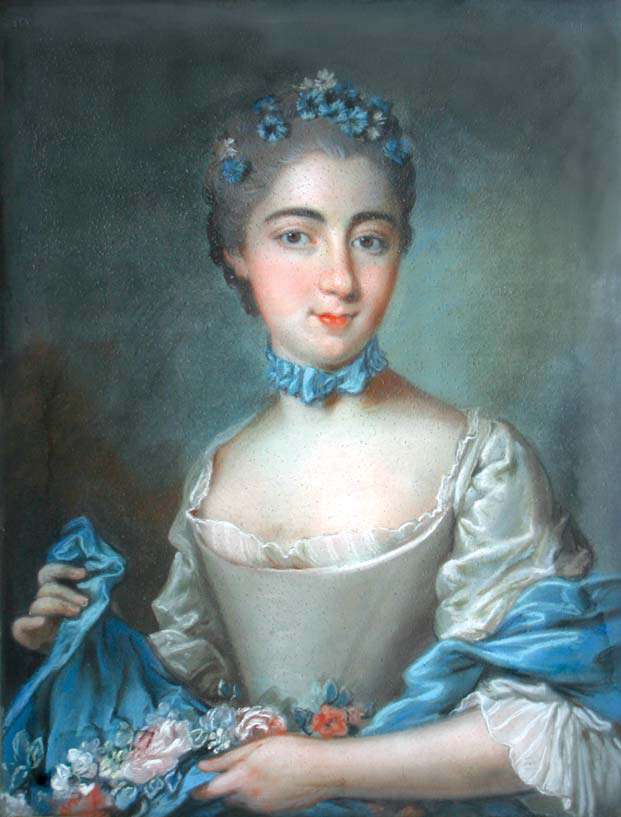 Portrait au pastel de Marie-Jeanne-Constance de Voyer d'Argenson (1734-1783) dite marquise de Voyer, née de Mailly d'Haucourt.